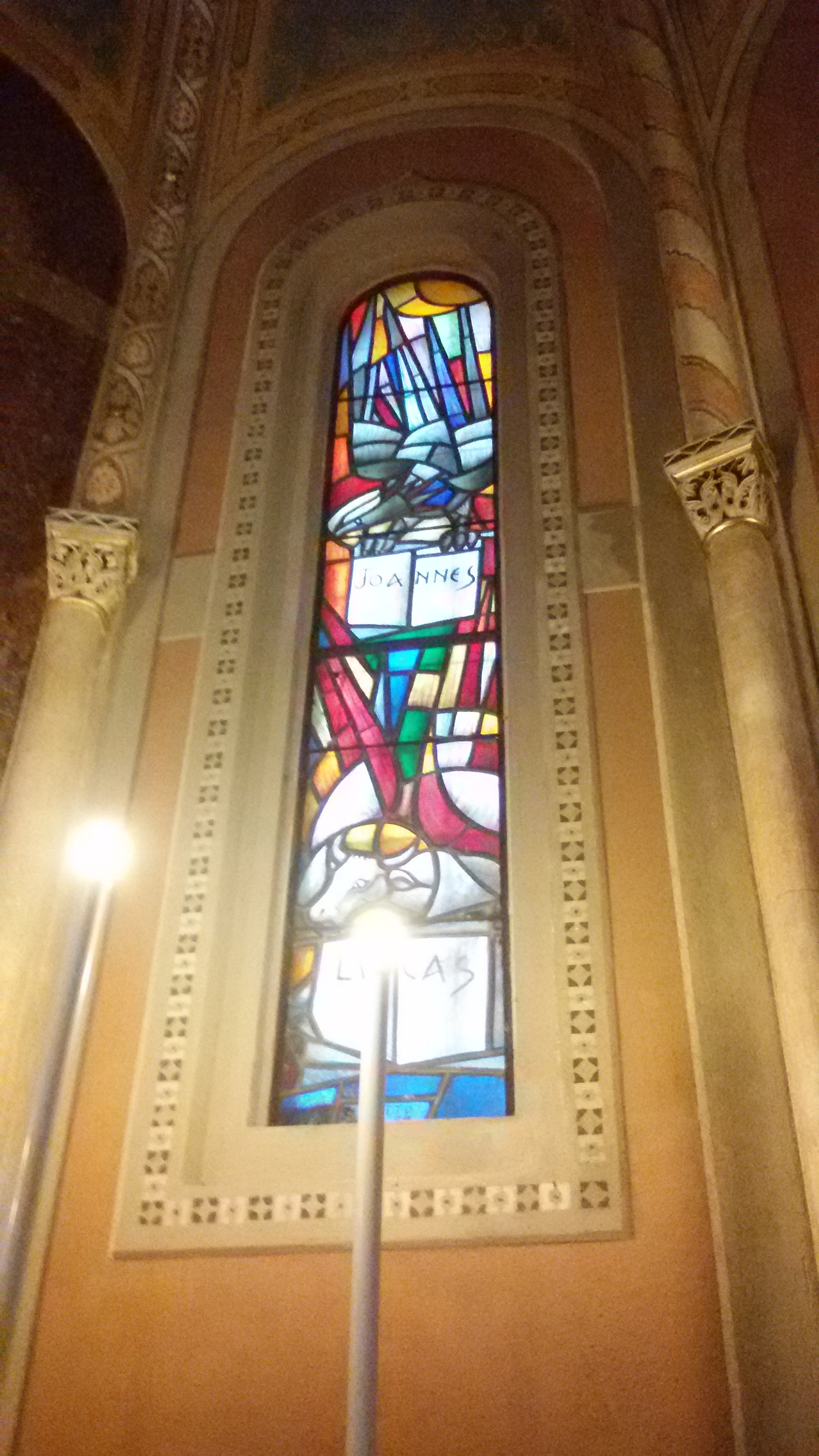 Chiesa di Santa Cristina Quinto di Treviso